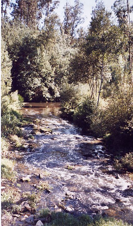 Rio Antuã nas proximidades de Ul.